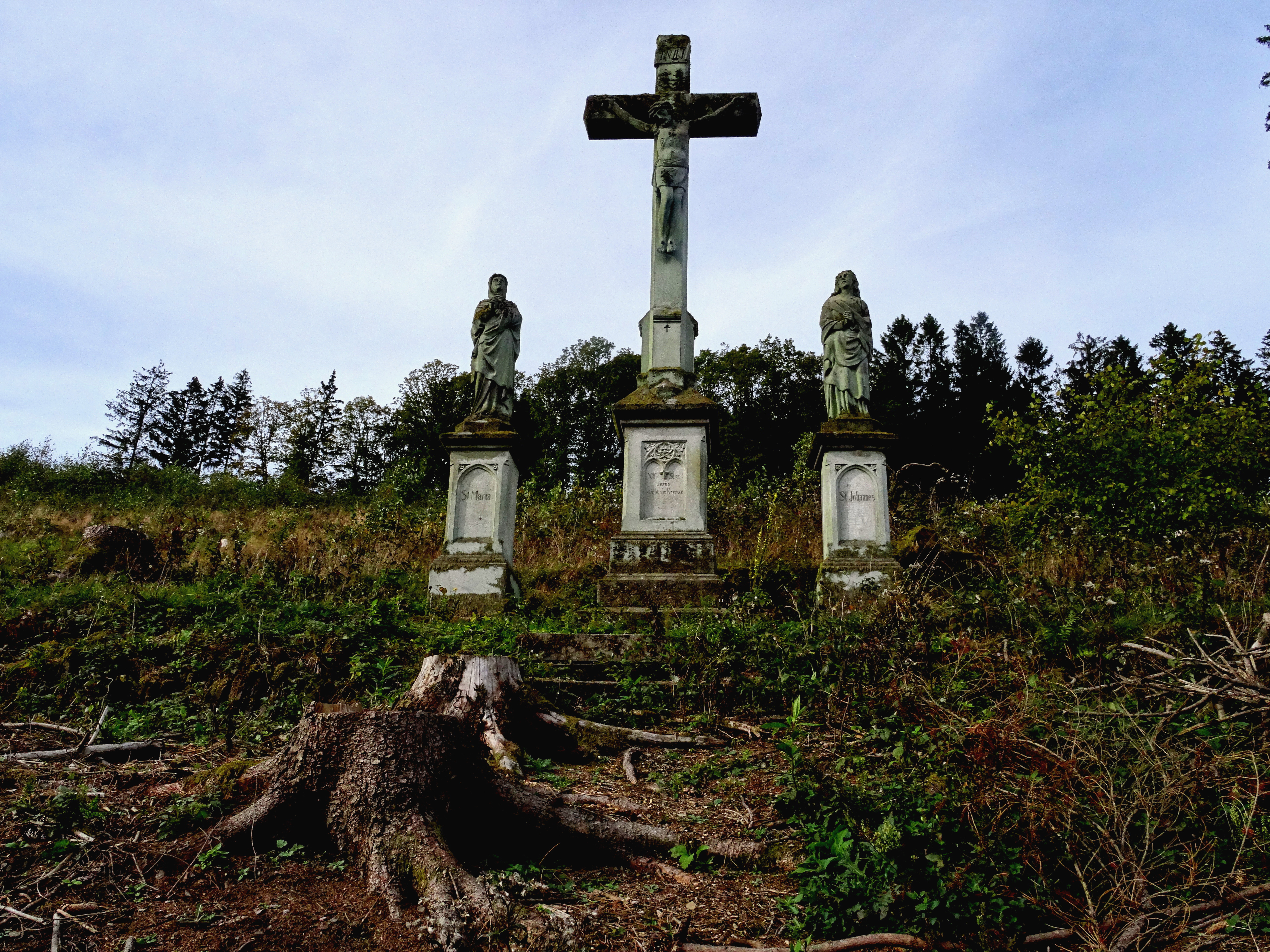 Bestwig-Nuttlar: Die Kreuzigungsgruppe vor dem Abbau. An dieser Stelle wird die neue Autobahn gebaut. This is a photograph of an architectural monument.